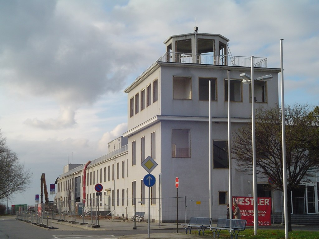 Nach nur einjähriger Planungs- und Bauzeit entstand 1935 eine vorbildliche Flughafenanlage vor den Toren der Stadt auf den Fluren von Klotzsche und Rähnitz: der Flughafen Dresden. Architektonisches Wahrzeichen wurde das seinerzeit elegante Abfertigungs- und Verwaltungsgebäude, nach der Deutschen Lufthansa AG als "Hansahaus“ bezeichnet. Der Abriss erfolgte im Jahr 2010.